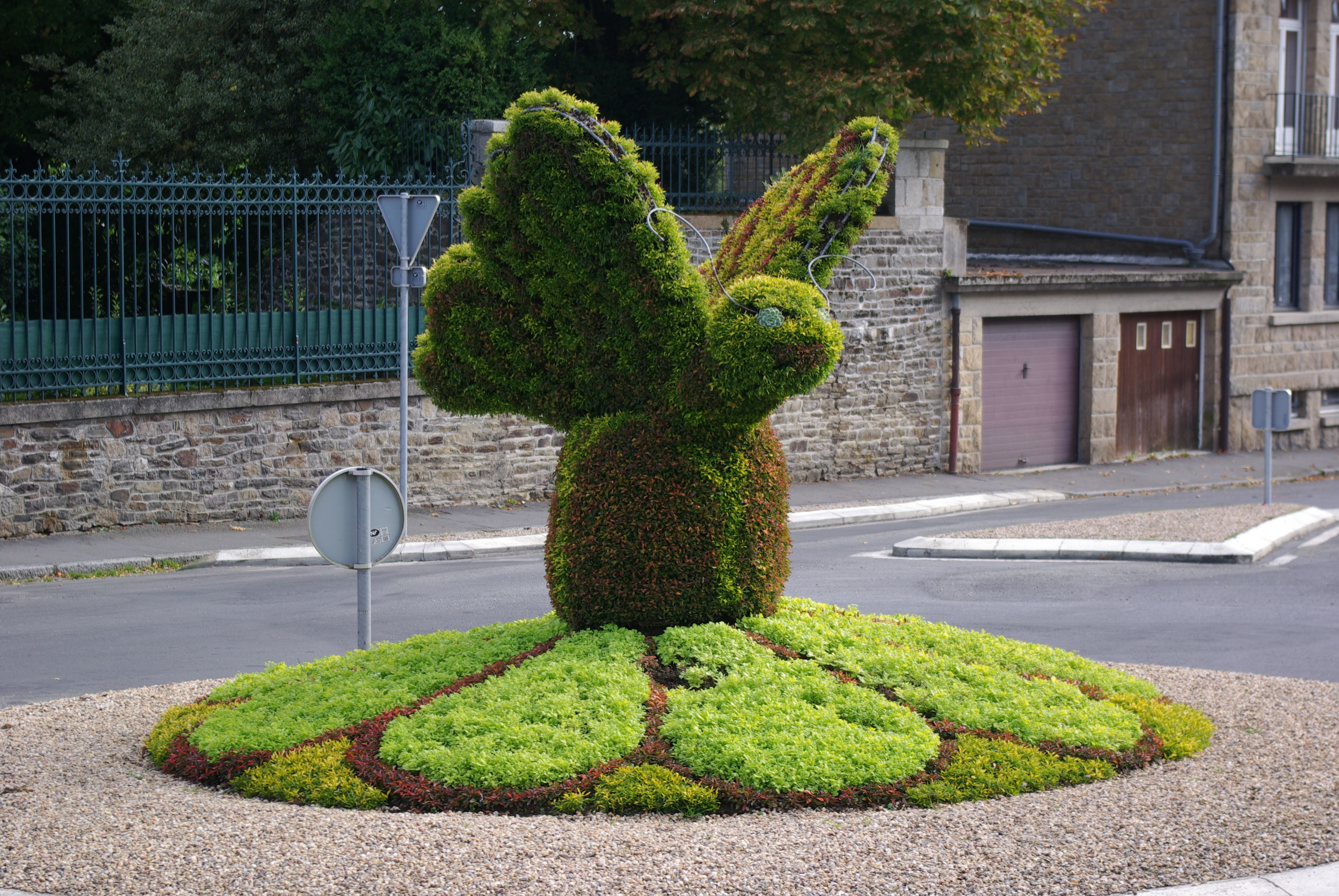 Fougeres in der Bretagne, Frankreich. Ein Kriesverkehr in der Stadtmitte, dargestellt wird ein Insekt durch einen Busch (geotags in den EXIF-Datei).